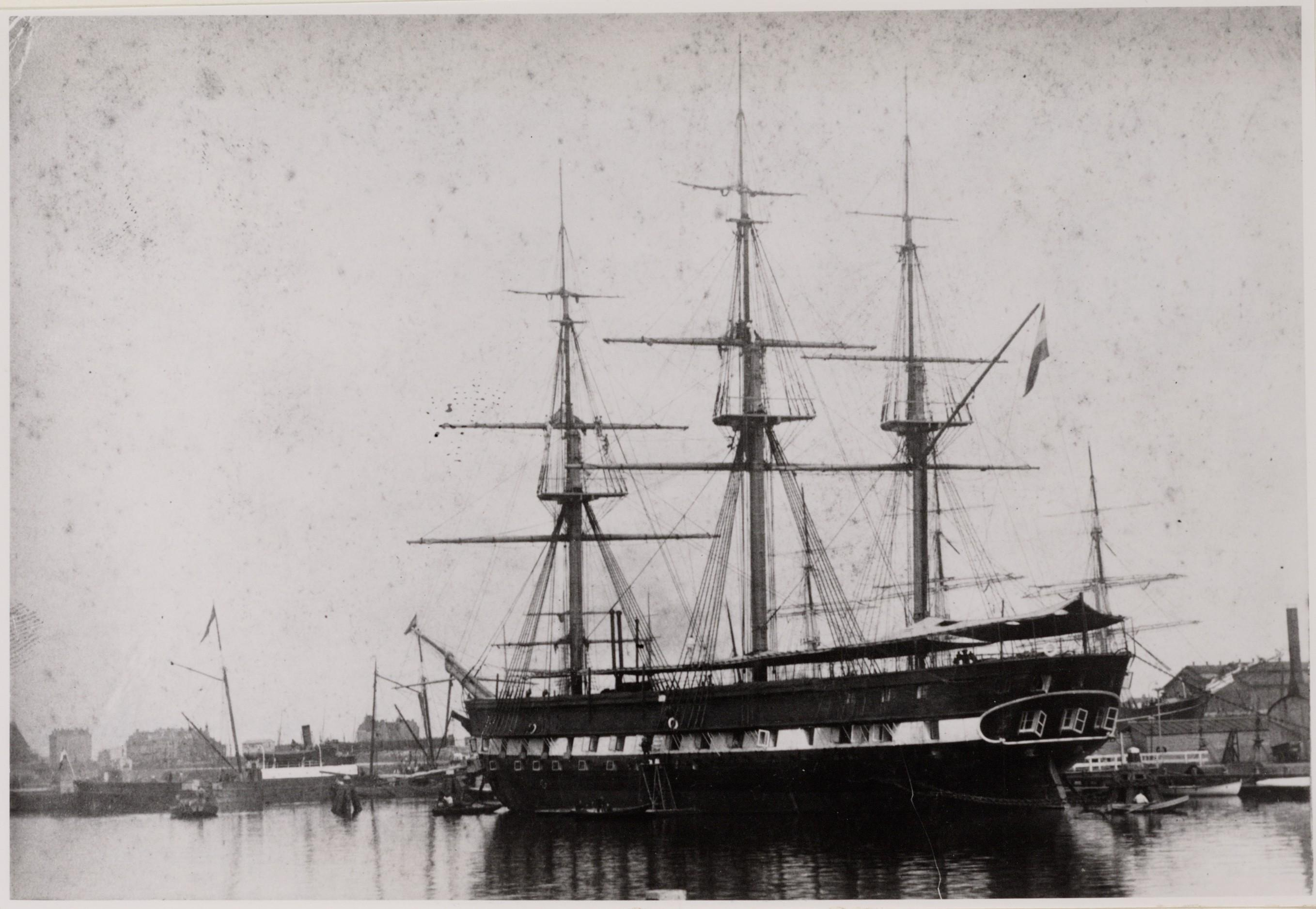 Beschrijving Het opleidingsschip voor de koopvaardij fregat Admiraal van Wassenaar in het Oosterdok nabij het Marine-etablissement Links de Oosterdokskade. Documenttype foto Vervaardiger Onbekend Anoniem Collectie Collectie Stadsarchief Amsterdam: foto-afdrukken Datering 1890 ca. Geografische naam Oosterdokskade Oosterdok Inventarissen Afbeeldingsbestand OSIM00003001591